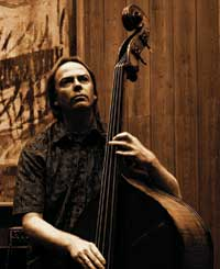 Terje Gewelt spiller konsert på Munch museet i Oslo sammen med Christian Jacob.